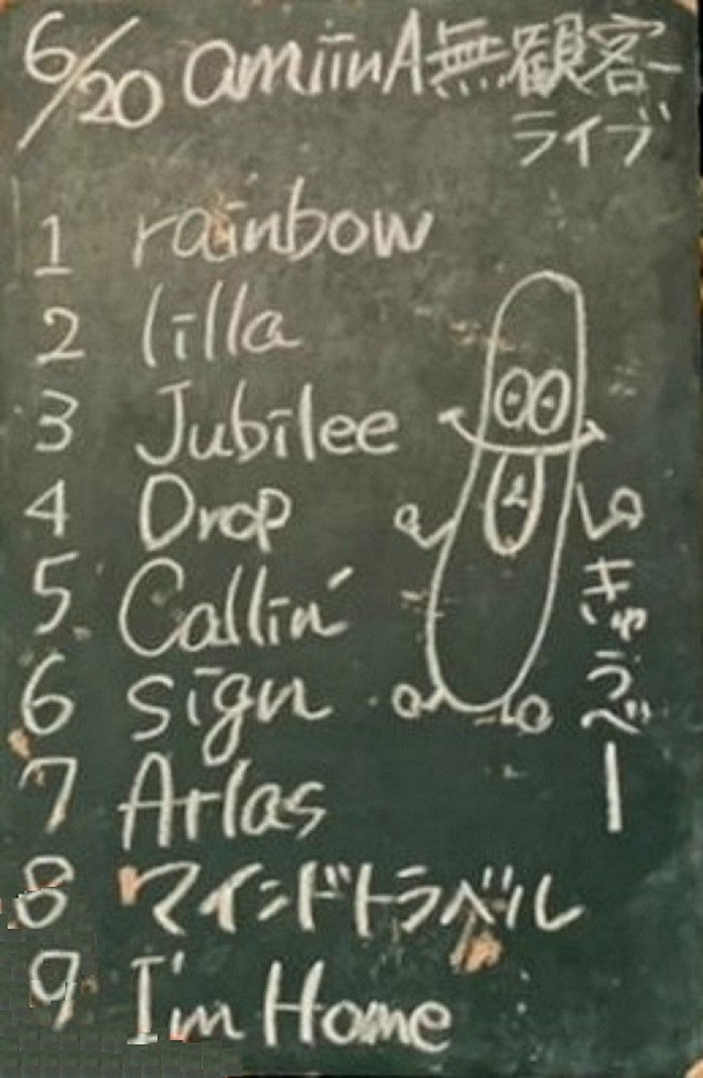 amiinAセトリボード